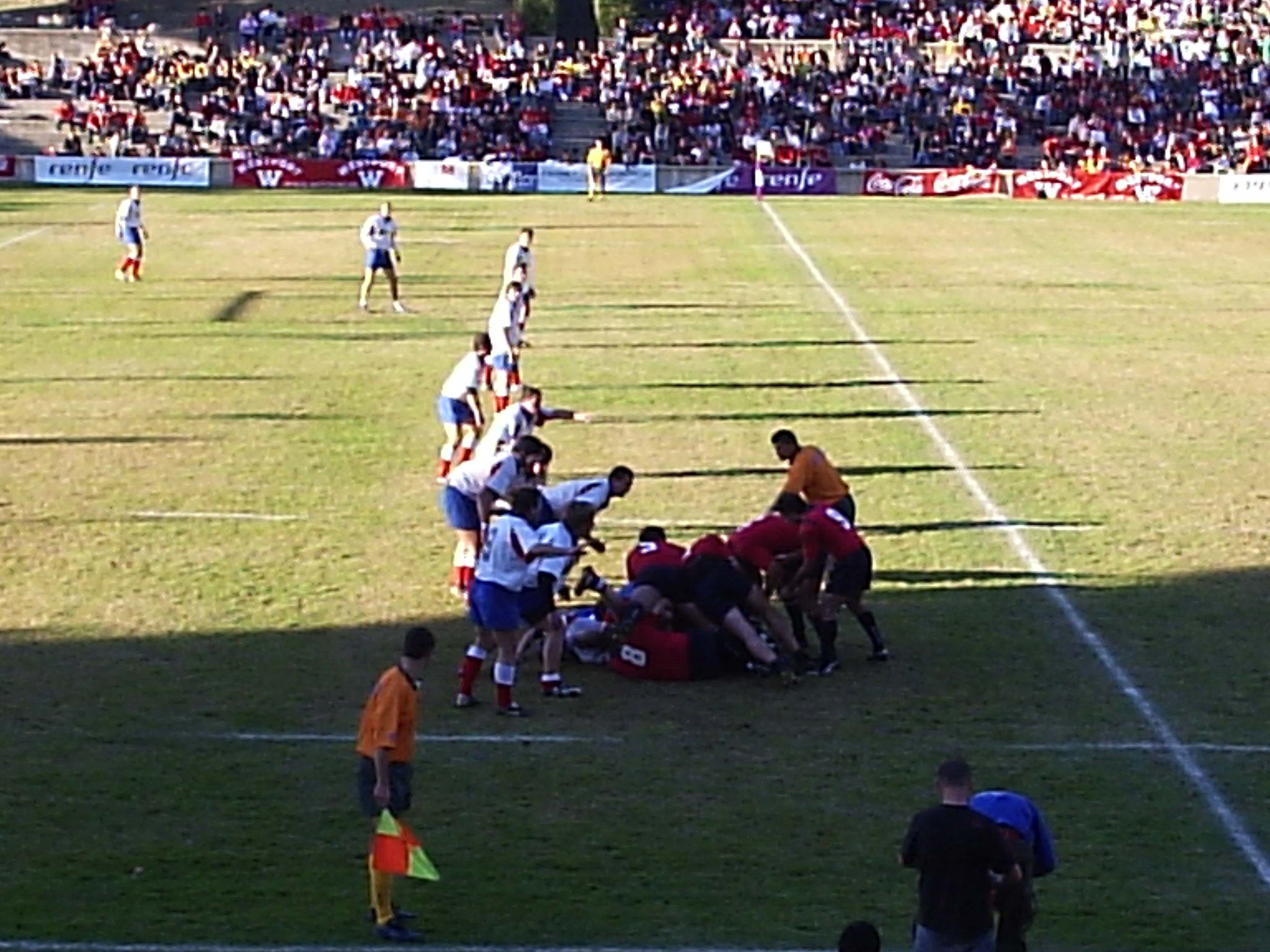 República Checa frente a España el 3 de Noviembre de 2007